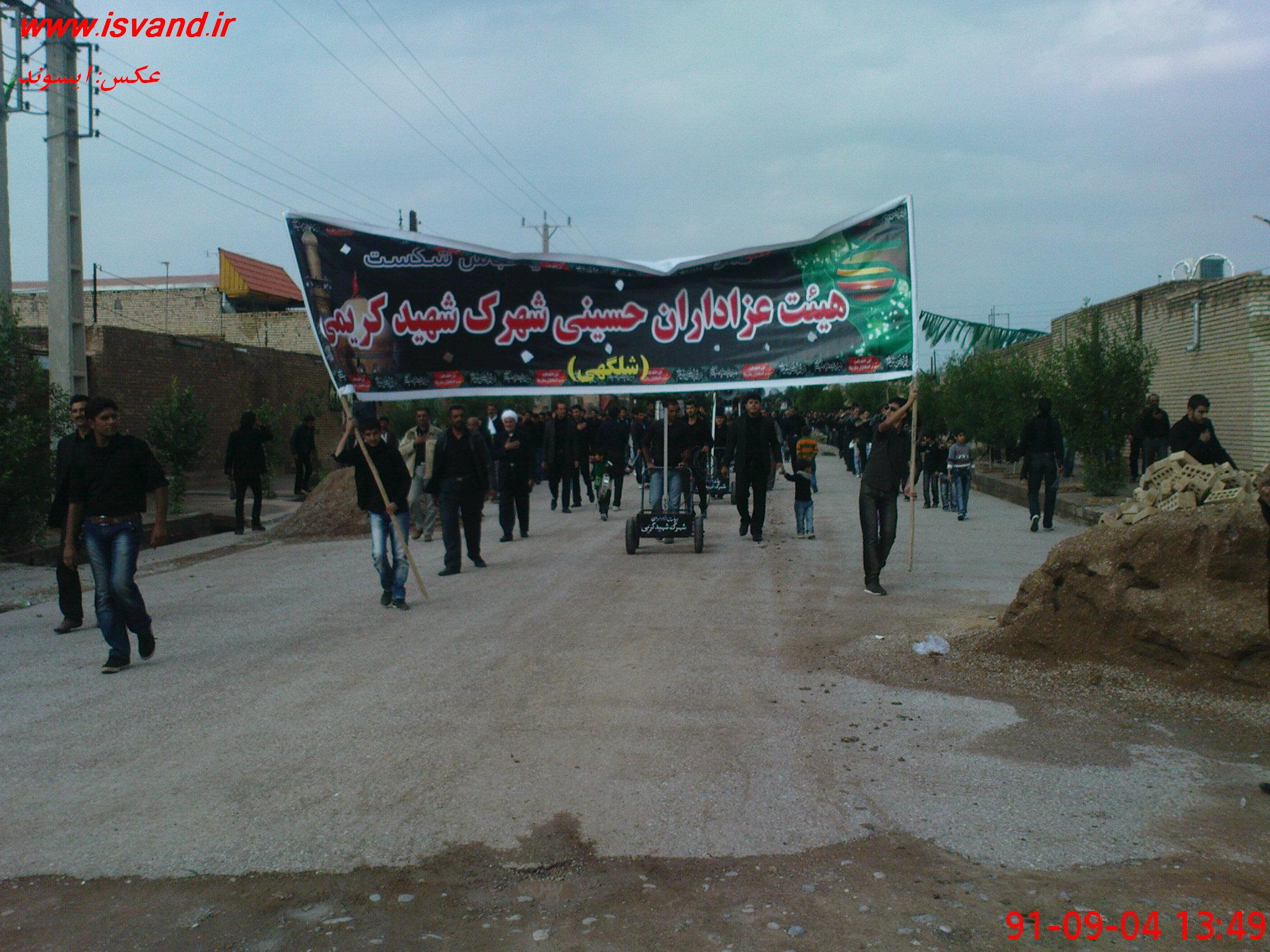 محرم 91 شلگهی